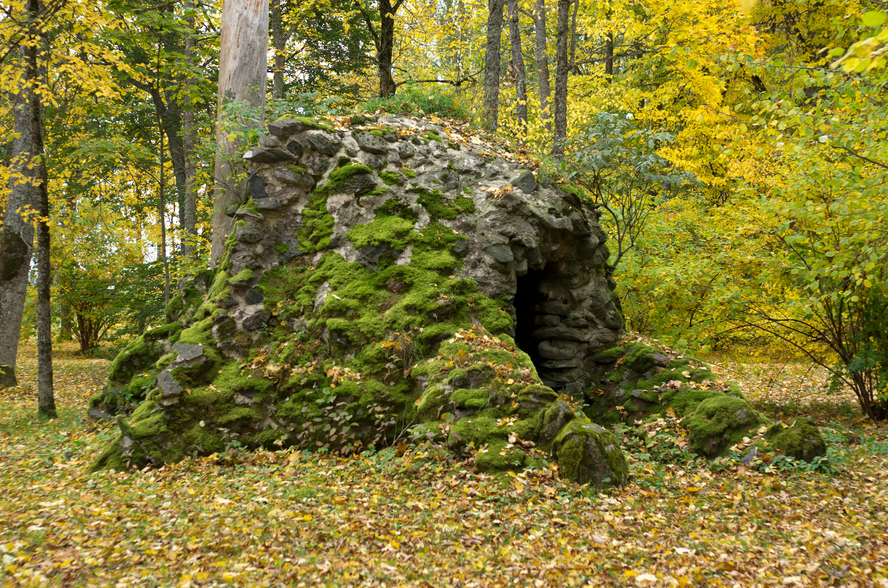 Voltveti mõisa pargigrott